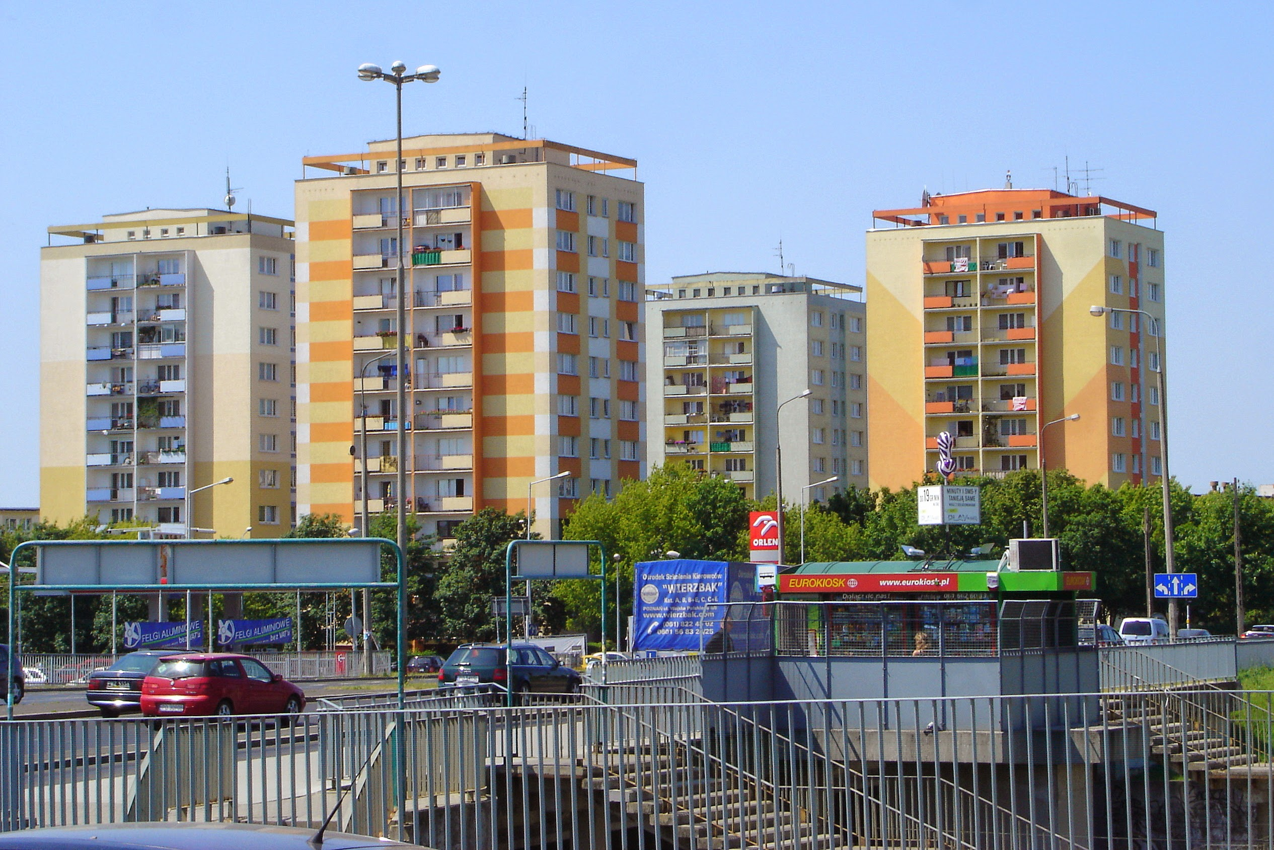 Bloki ul. Piątkowska